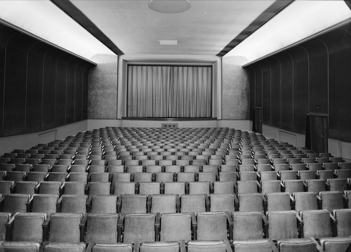 Sinsen kino, salen